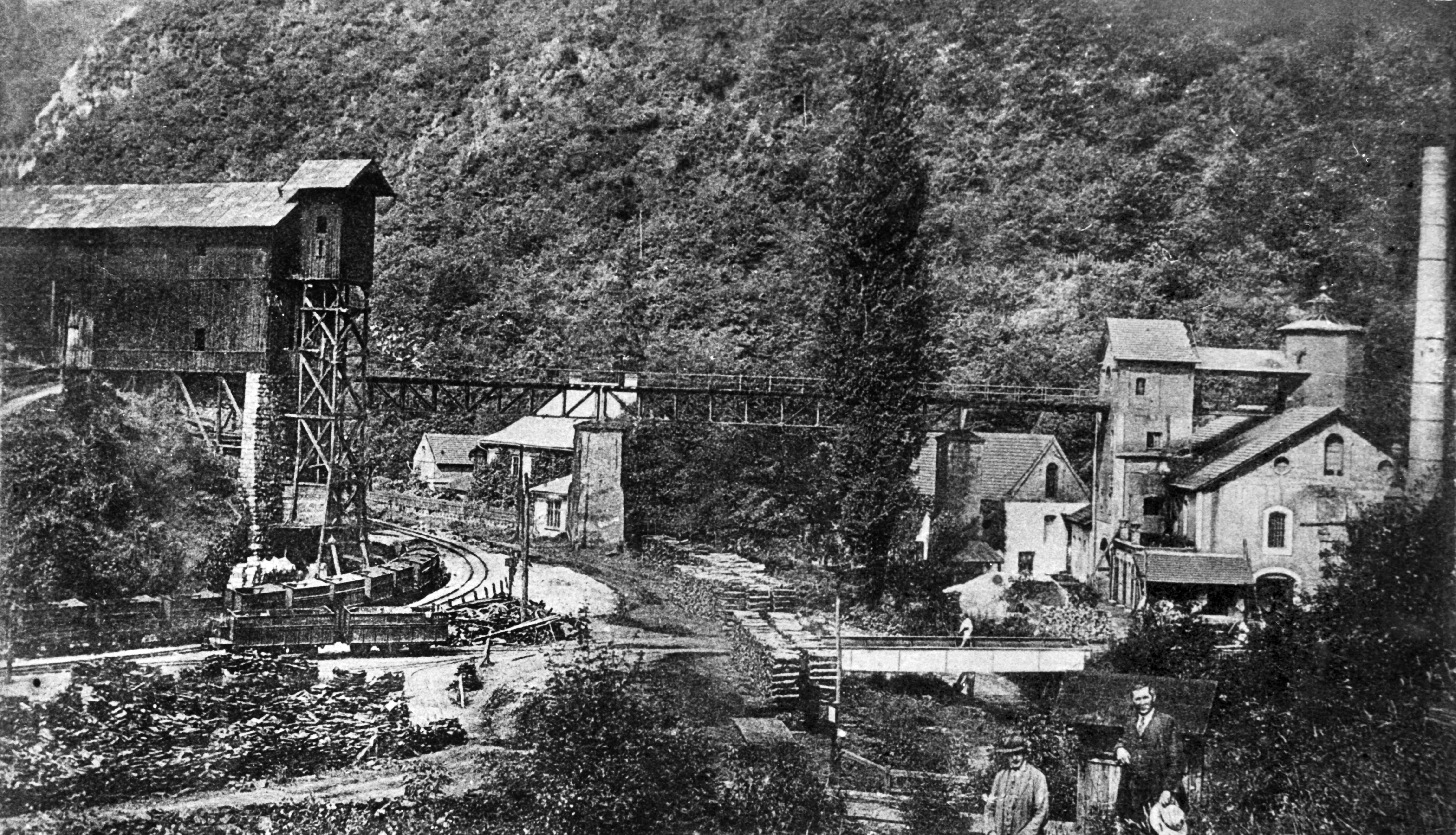 A govasdiai nagyolvasztó 1900 után, Govasdia, Vajdahunyad, Románia